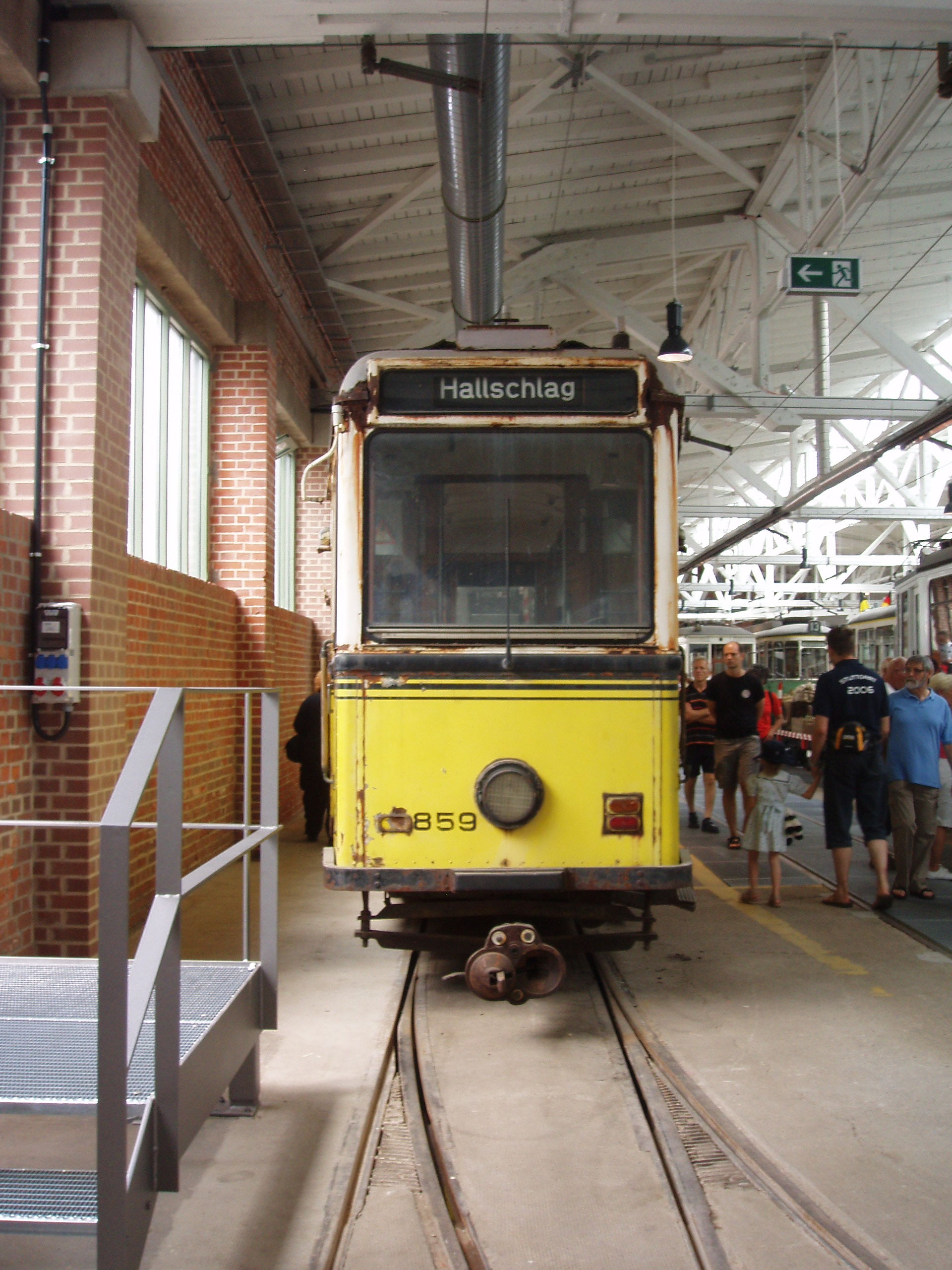 Stuttgarter Straßenbahnmuseum: Tw 859 wurde 1939 anlässlich der Reichsgartenschau erbaut und angeschafft, stand 30 Jahre im Straßenbahnmuseum in Hannover und kehrte 2003 in desolatem Zustand nach Stuttgart zurück. Kauf und Transport kosteten 6000 Euro, die Aufarbeitung dürfte 4000 Arbeitsstunden kosten.